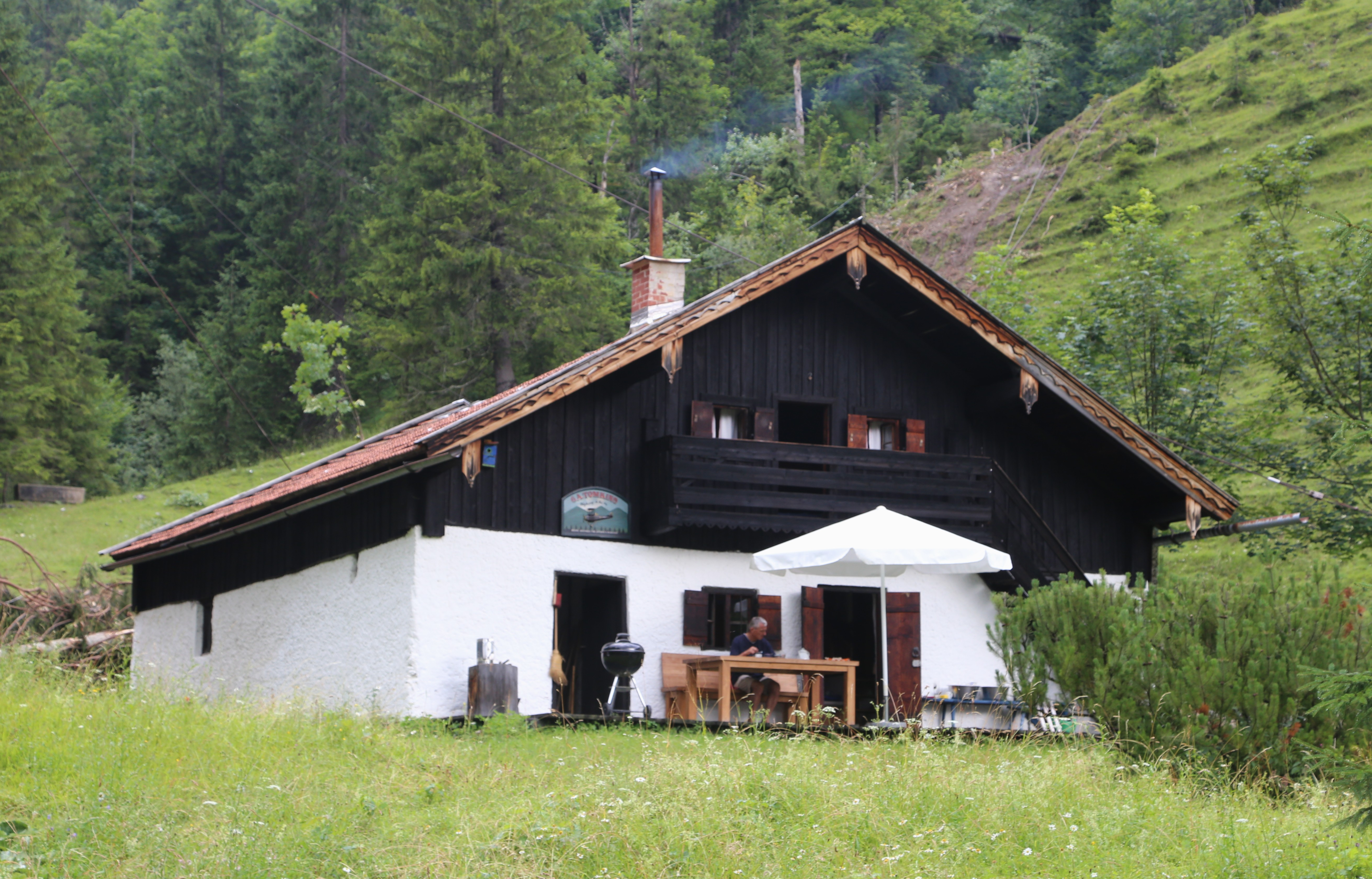 Grandlkaser, Oberaudorf; Almhütte, Erdgeschoss massiv, hoher Kniestock und Giebel holzverschalt, 1838, Umbau 1935.